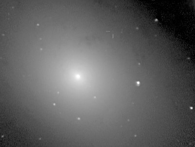 Nova in M31